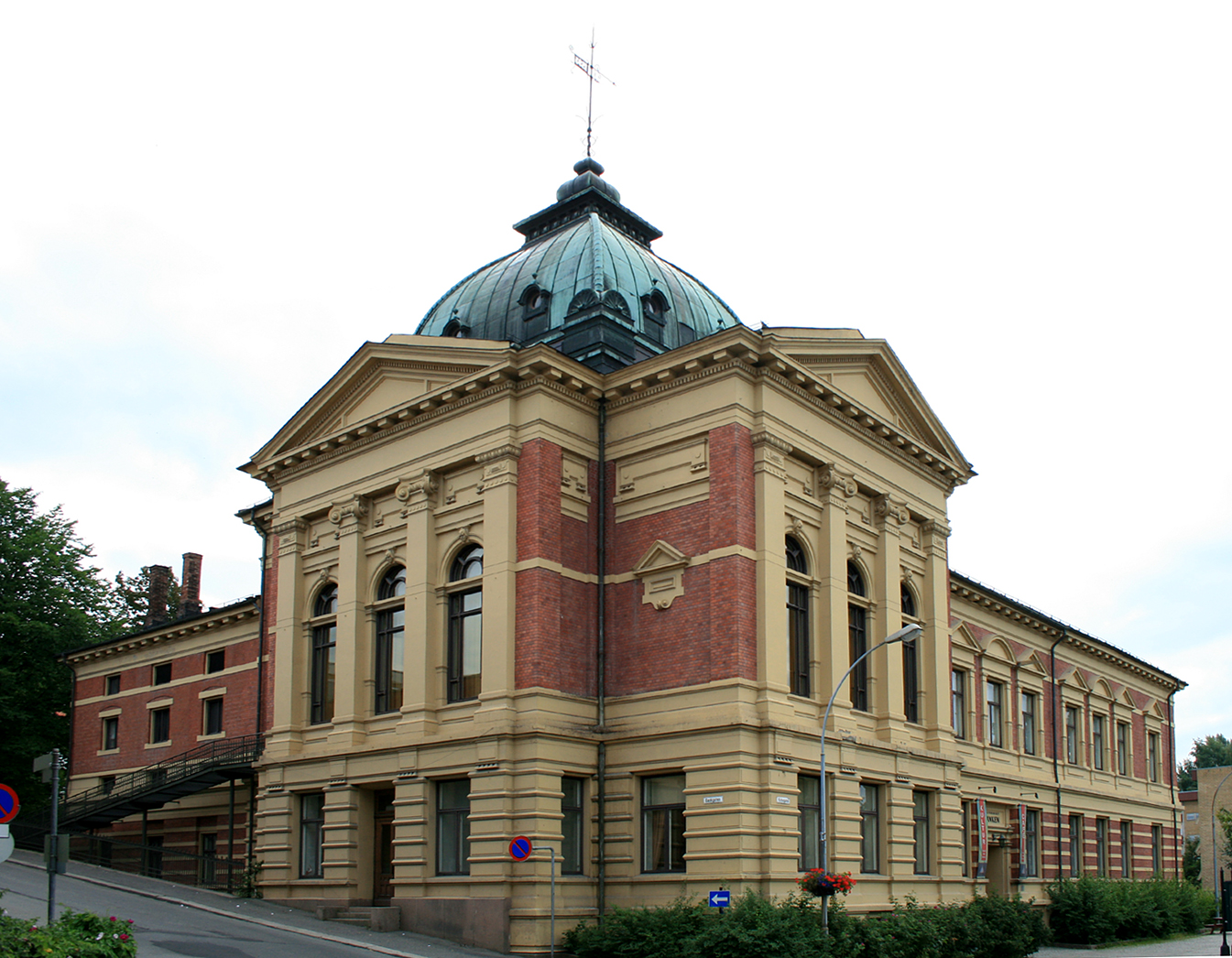 Kulturhuset Banken, Lillehammer, Norway.